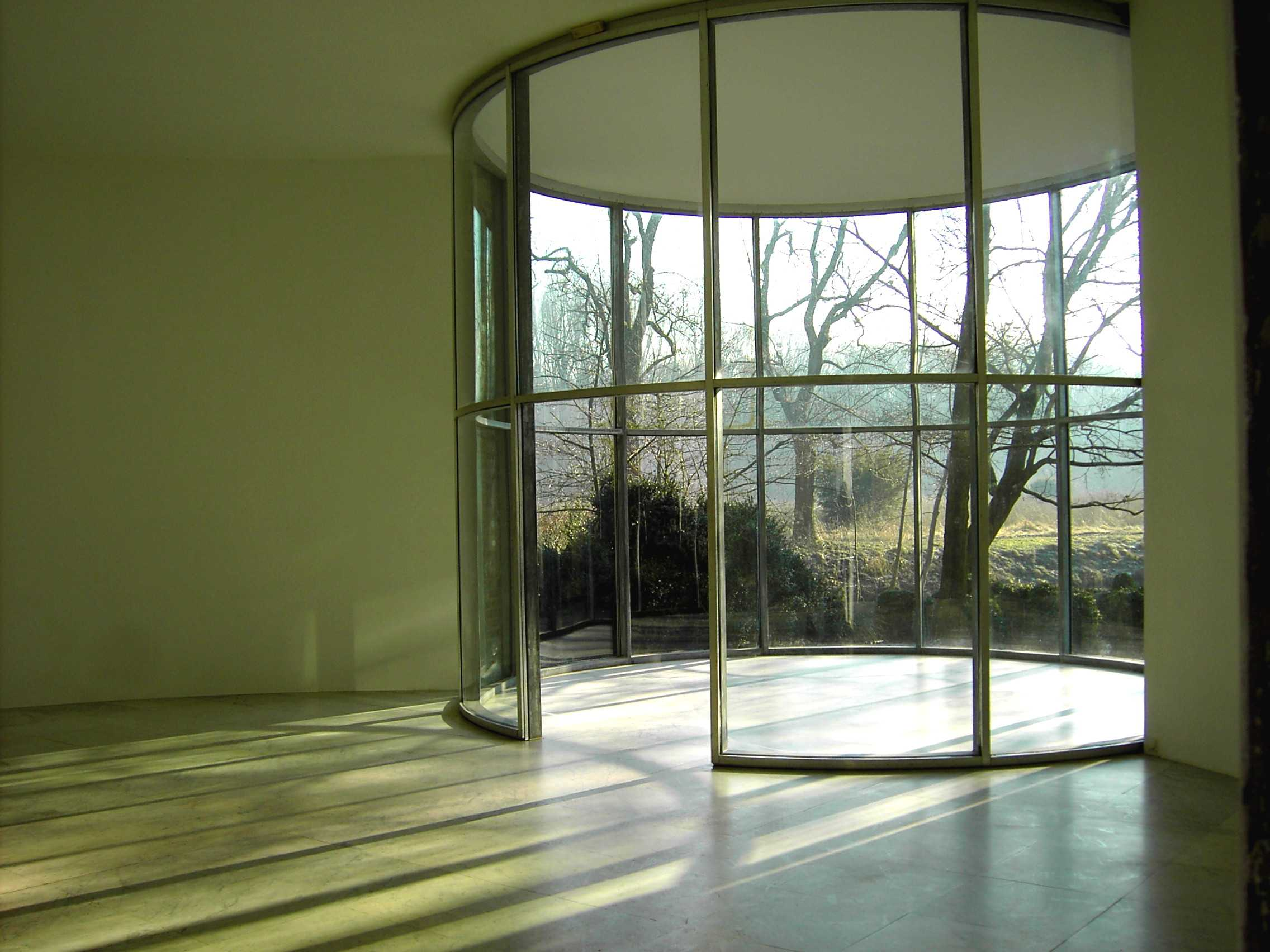 Erwin Heerich, Graubner-Pavillon, Insel Hpmbroich